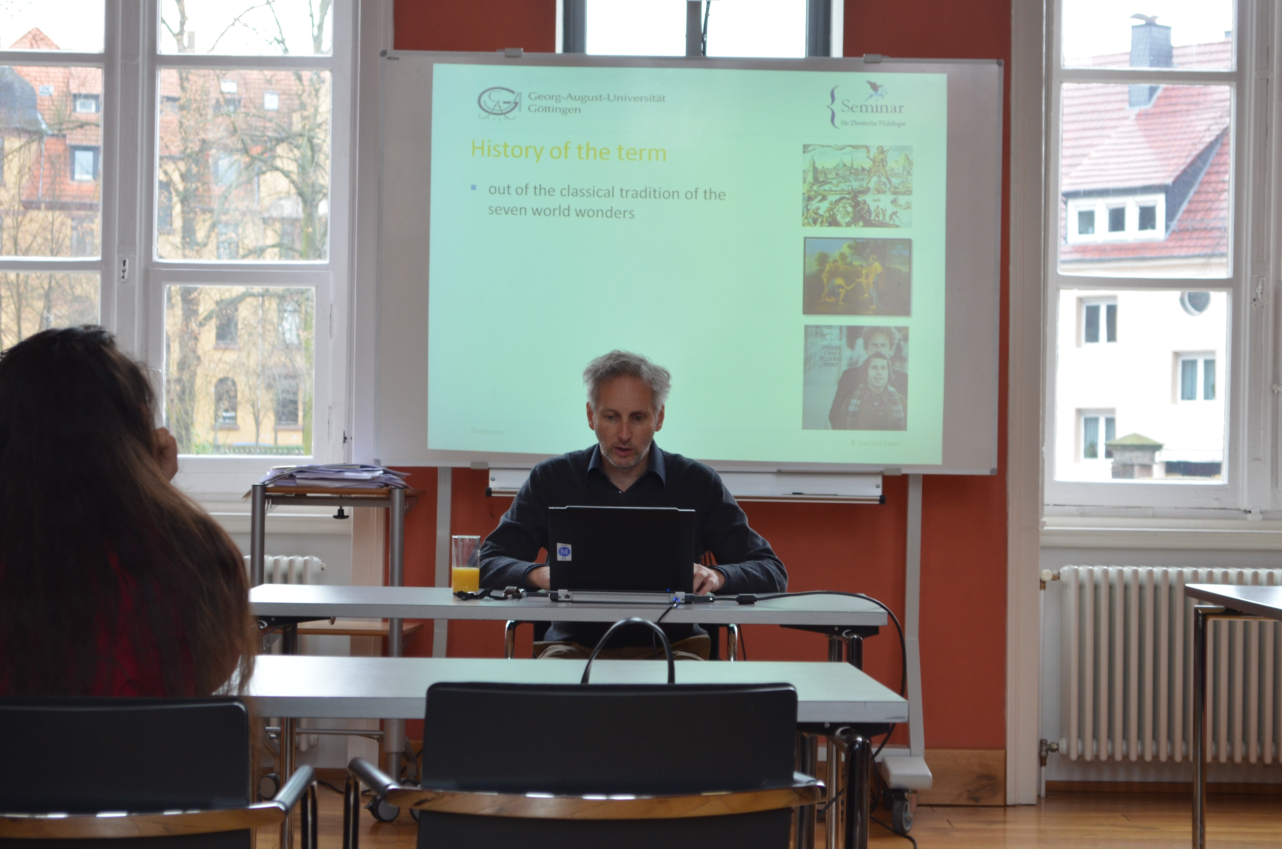 Professor Gerhard Lauer.